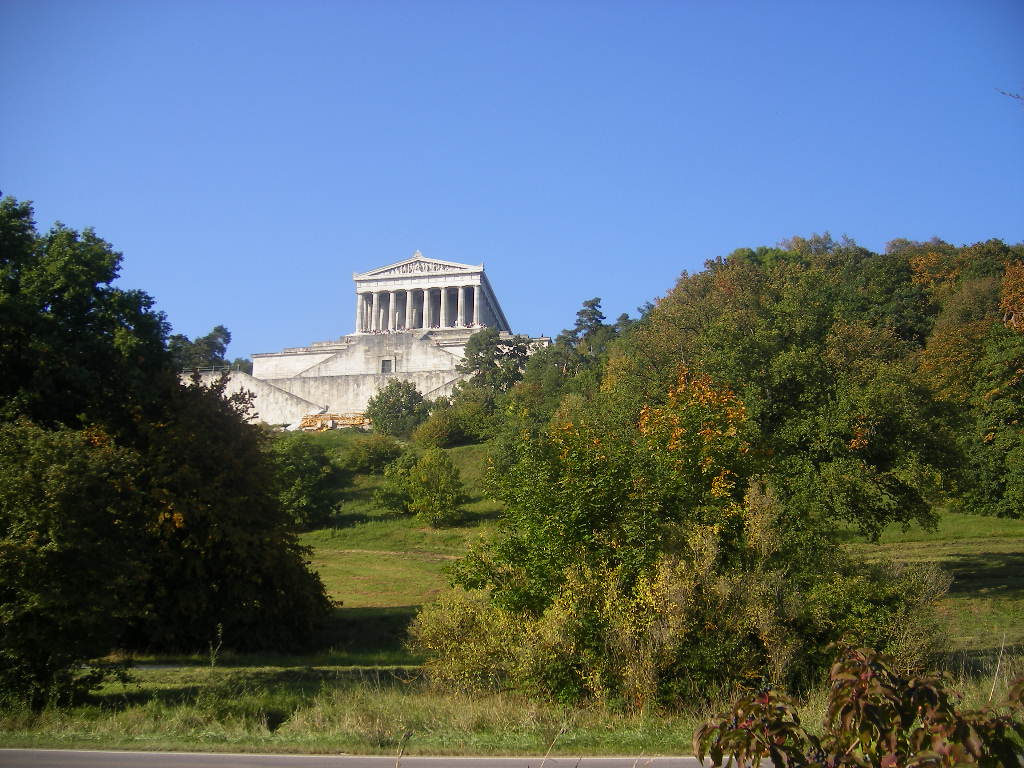 Donaustauf - Walhalla